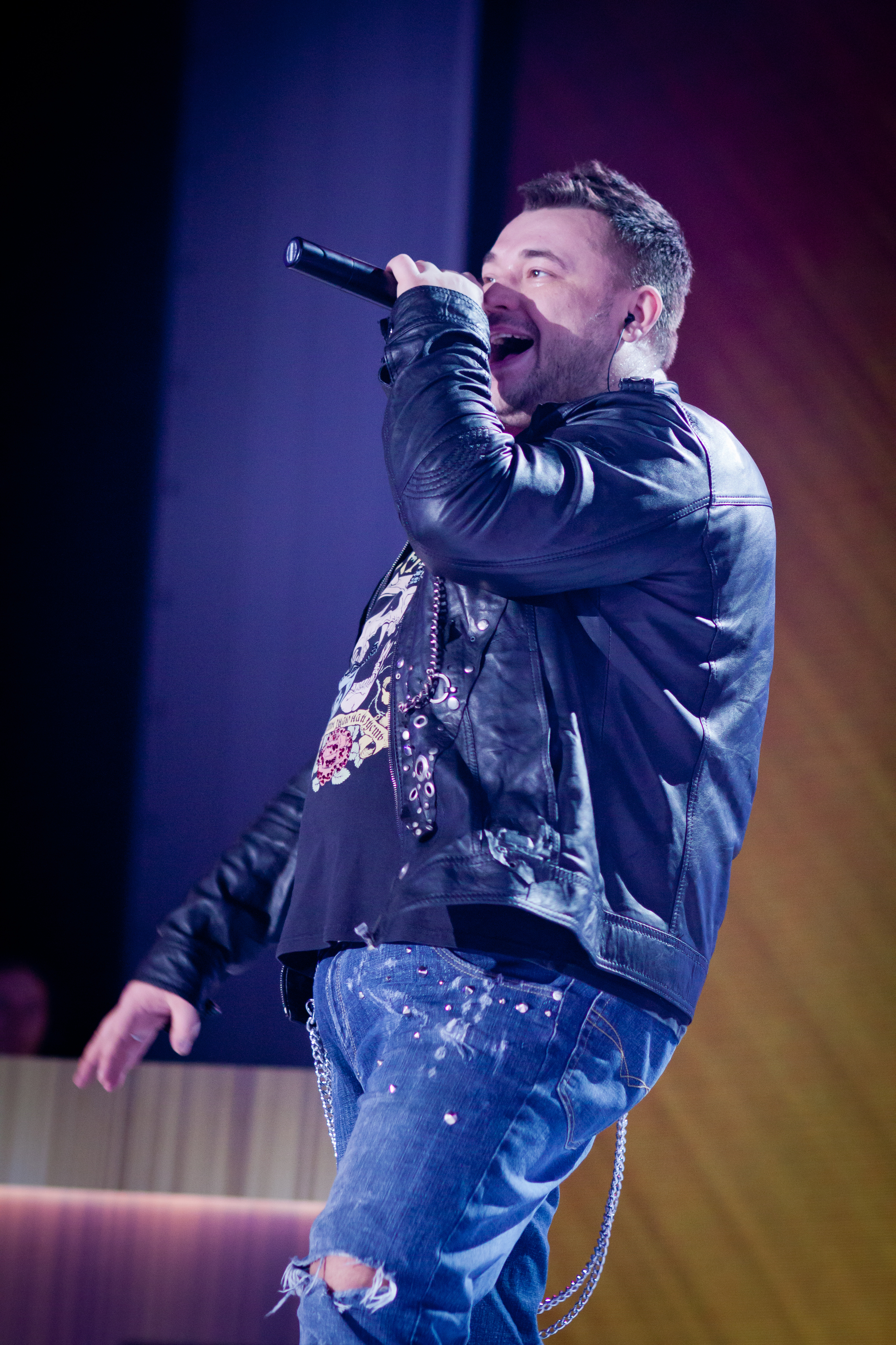 Группа "Руки вверх!" на "Премии Рунета - 2012" (Сергей Жуков)